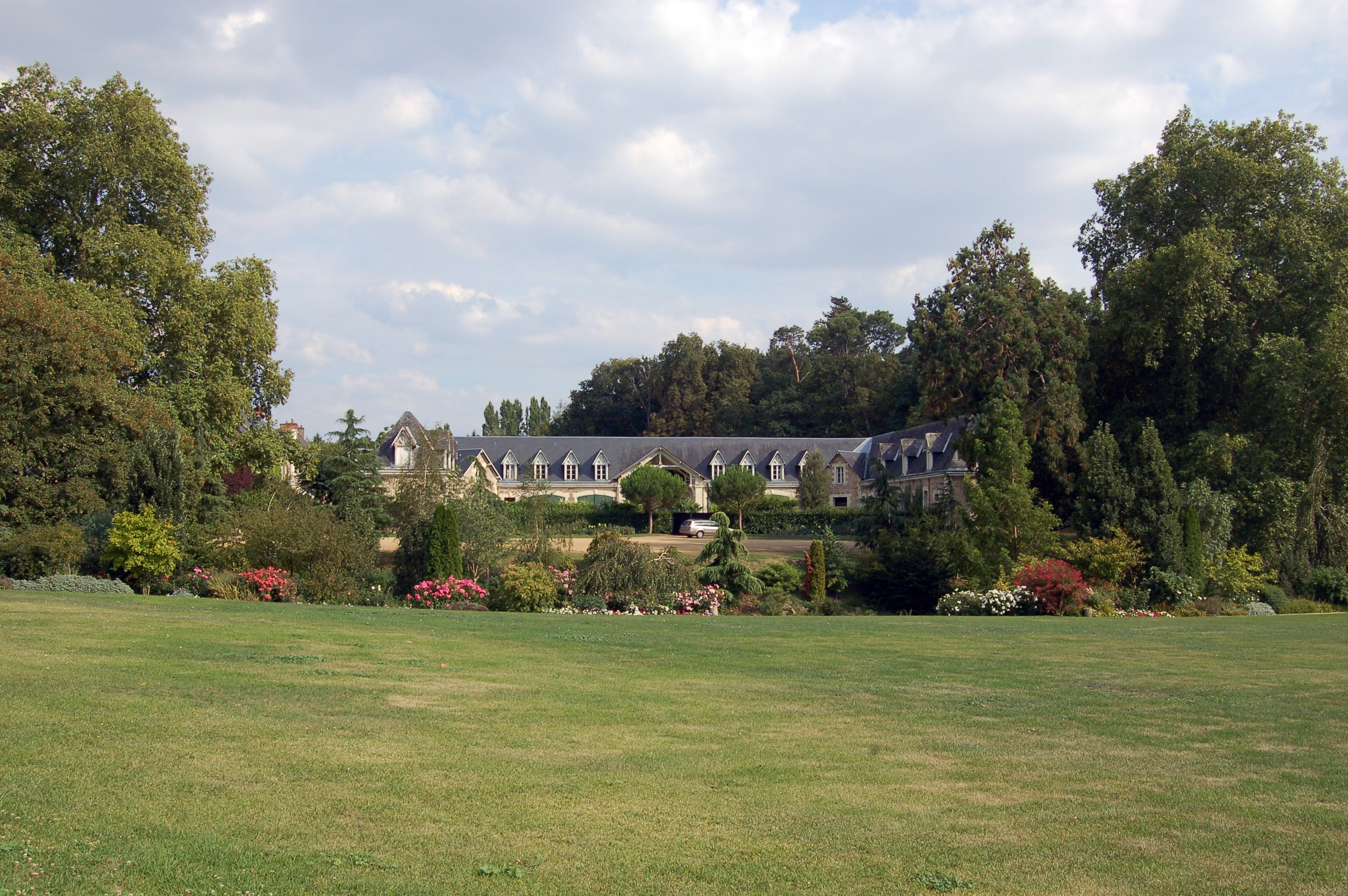 Gestüt am Rande des Schlossparks von Brissac